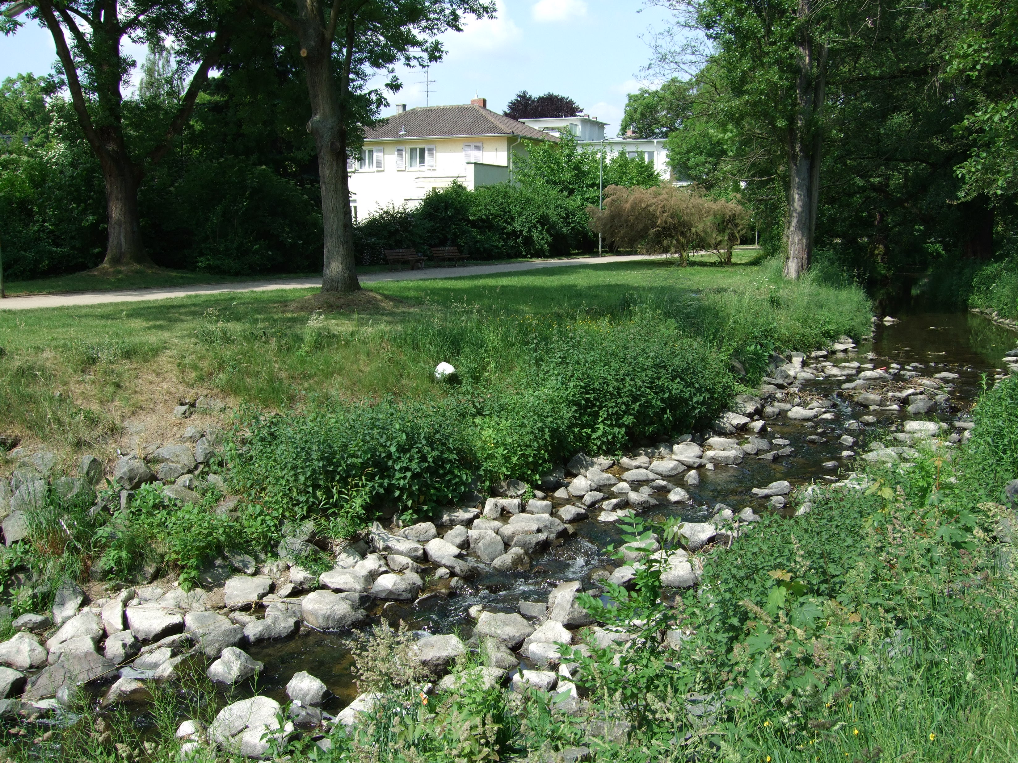 Liederbach mit rauher Sohlrampe